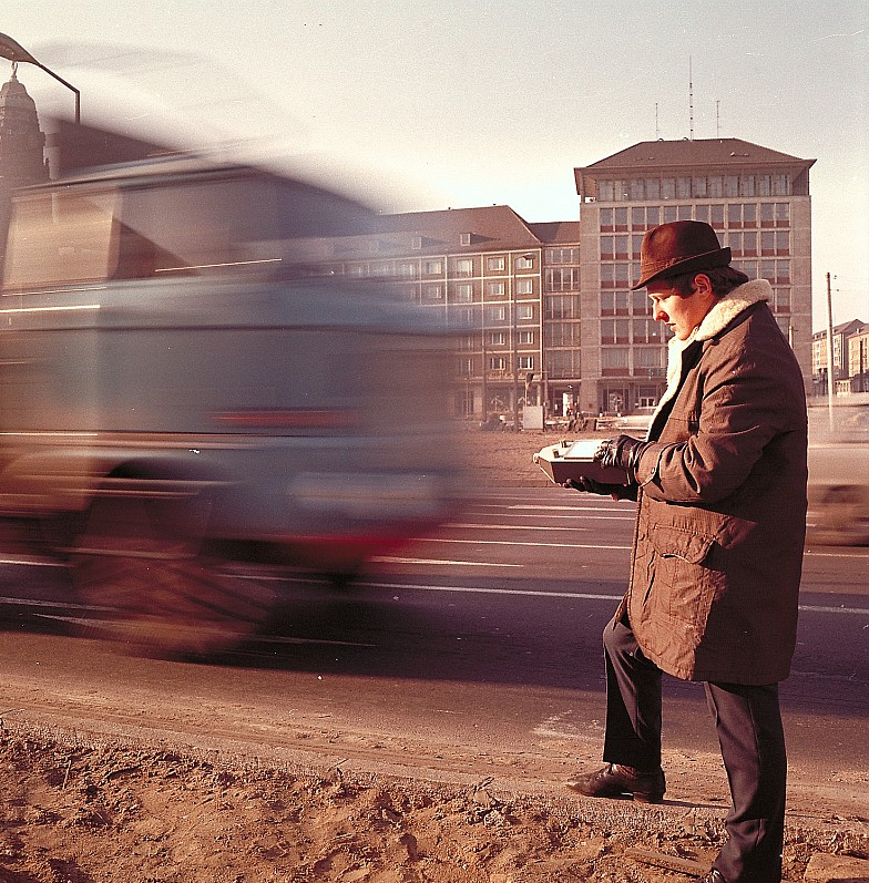 Original image description from the Deutsche Fotothek Verkehrslärmmessung